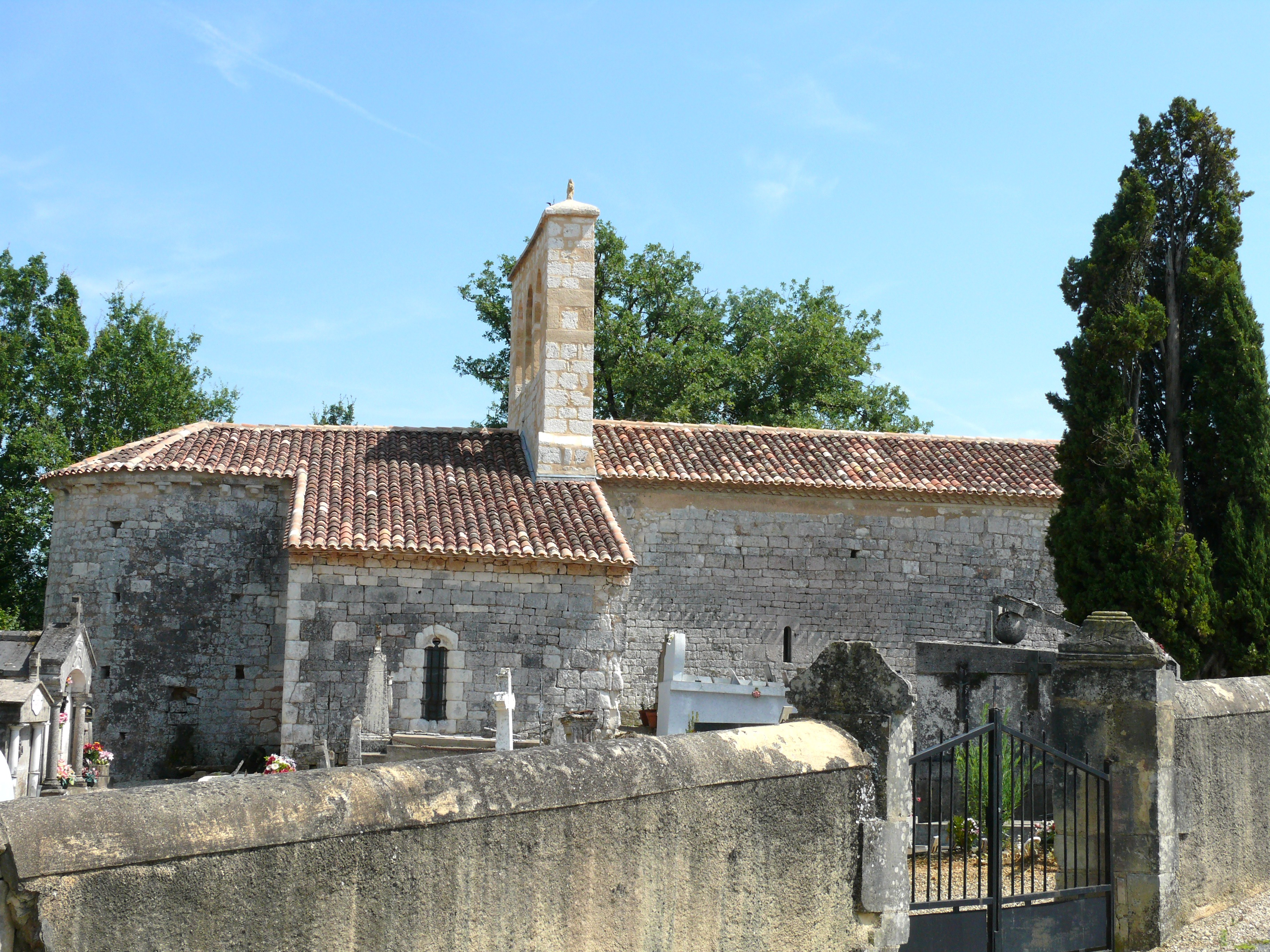 Gaugeac - Eglise Saint-Pierre-ès-Liens